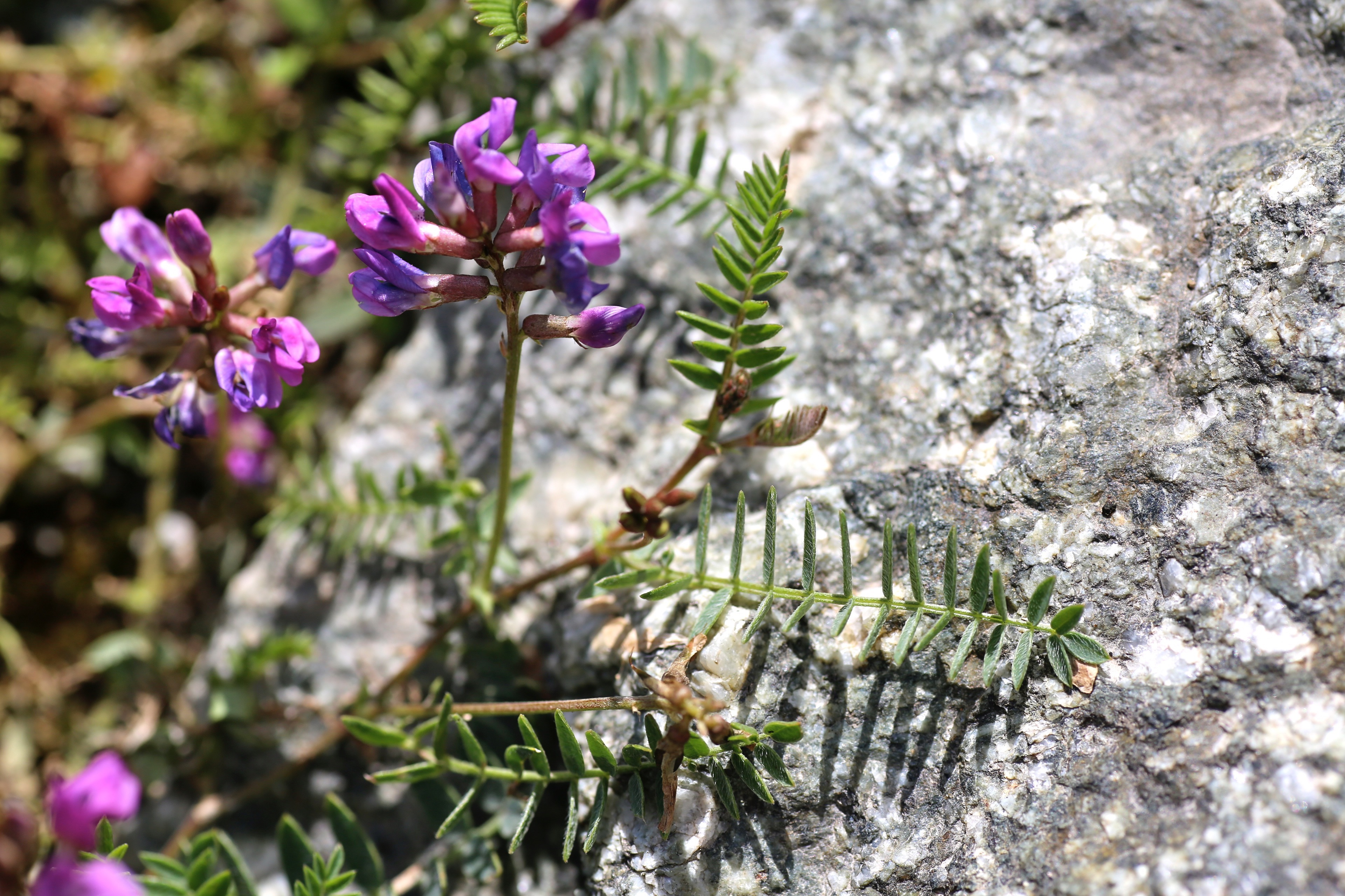 Kyrgyzstan, Issyk-Kul reg., Jety-Oguz distr., 15 km S Barskoon vill., Terskei Ala-Too Range, Barskoon gorge, near Barskoon river, 2400 m